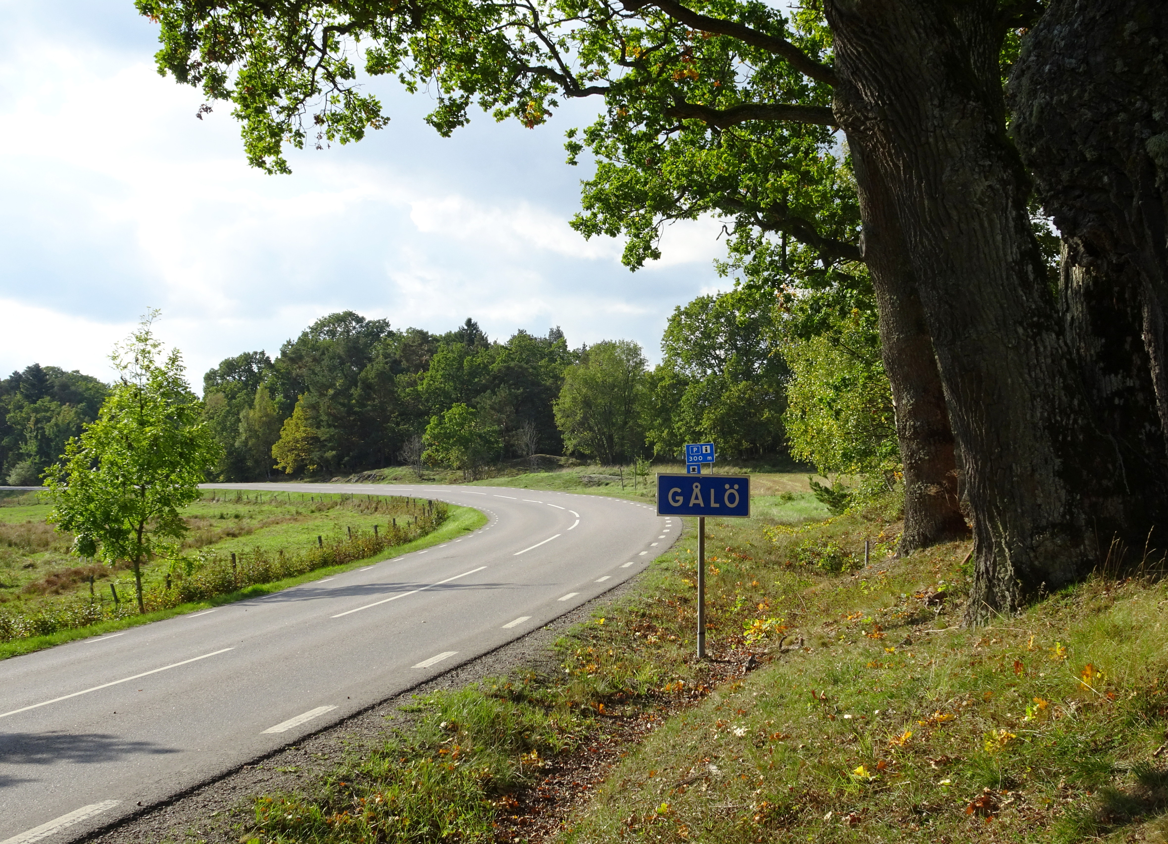 Gålö, ortsskylt